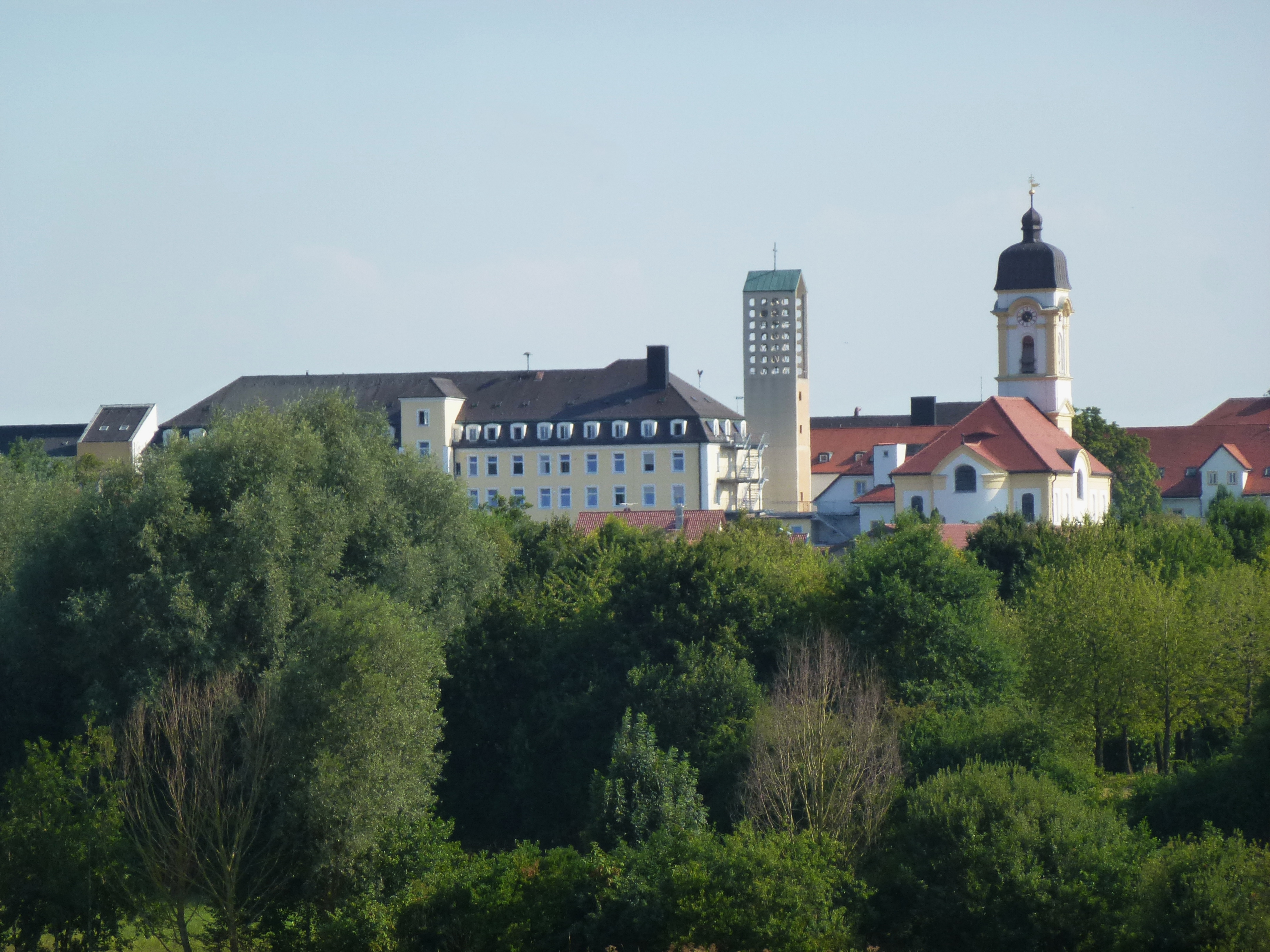 Schönbrunn, Kirchweg 4: Katholische Filialkirche Hl. Kreuz (rechts), Klosterkirche St.Josef (links). Ansicht aus Norden. Aufgenommen von der Straße nach Rudelzhofen.